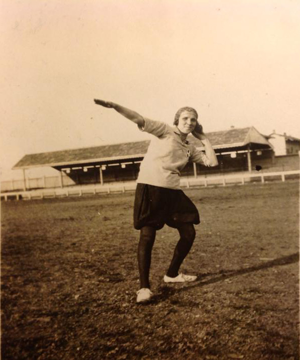 Maria Piantanida alle prese con il getto del peso.